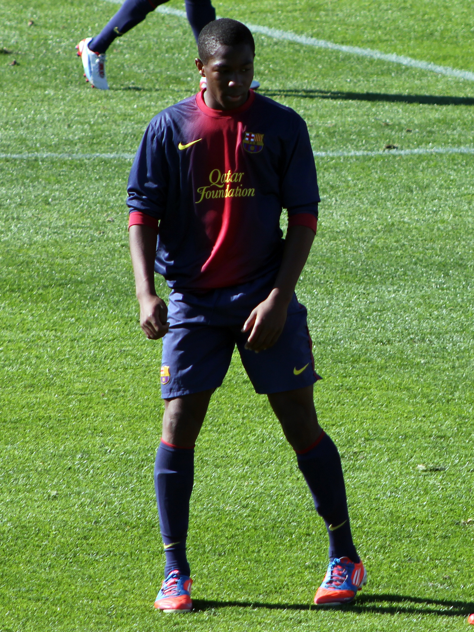 Foto realizada por Javier Segura (@castroquini)